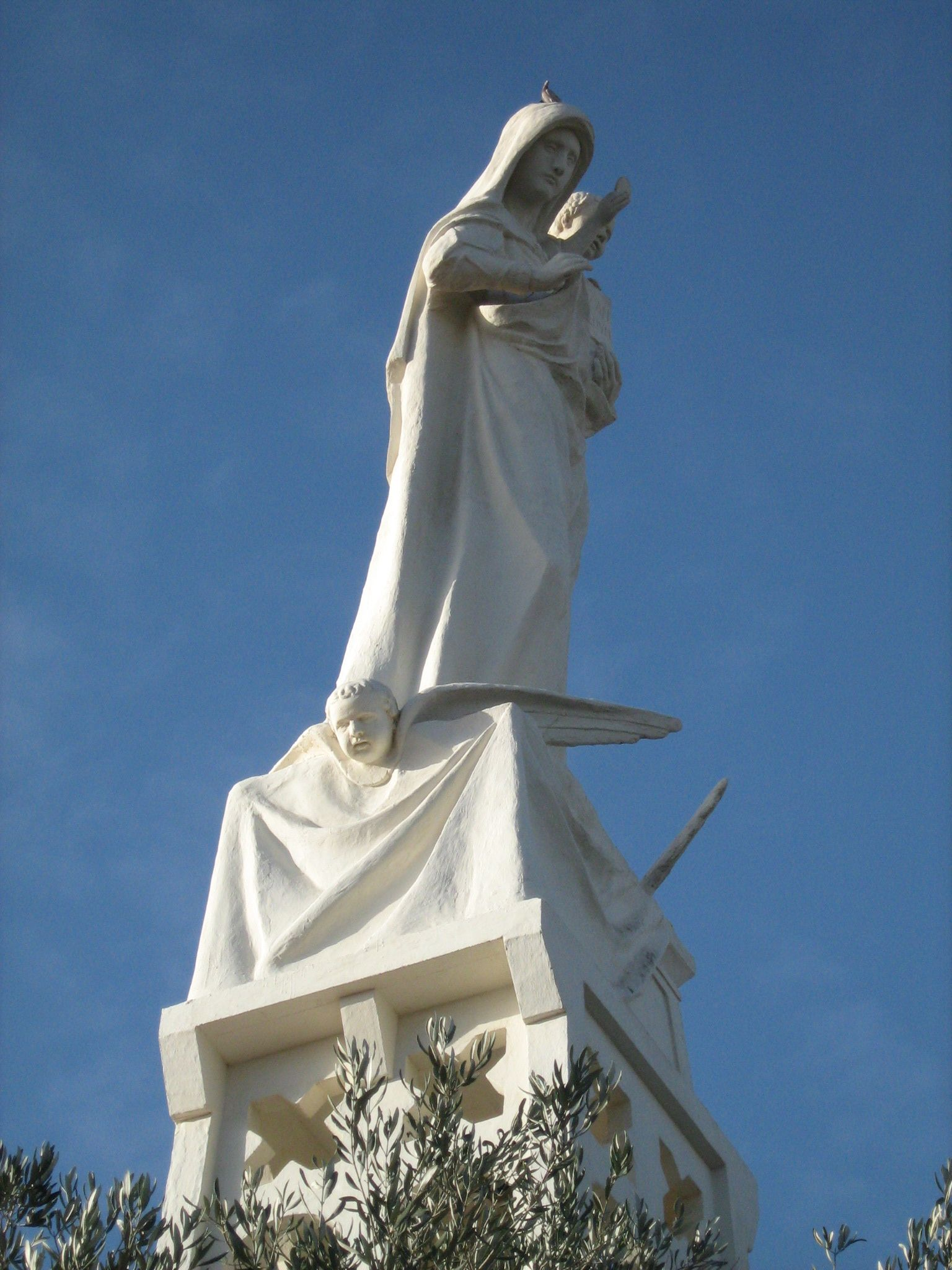 פסל הבתולה והילד בכנסיית גבירתנו של ארון הברית באבו גוש